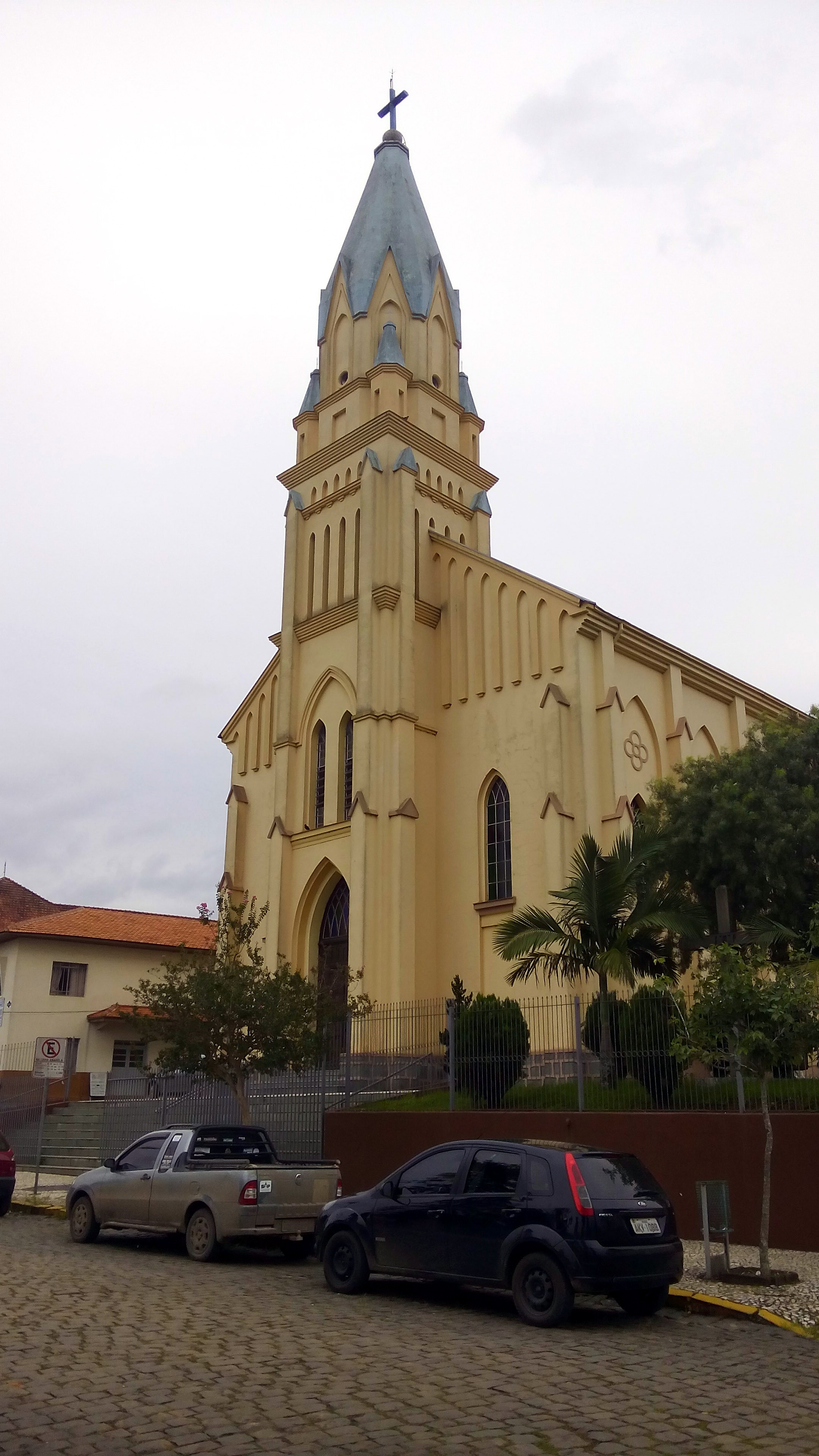 Parroquia São Miguel, en la ciudad de Irati, estado de Paraná, Brasil.